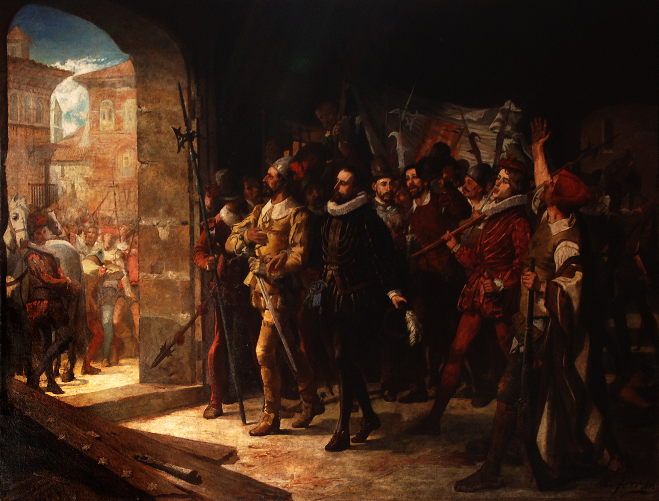 Alliberament d'Antonio Pérez estadista castellà. Titular de la secretaria d'estat, li foren confiats els afers d'Itàlia, i aviat assolí la confiança de Felip II